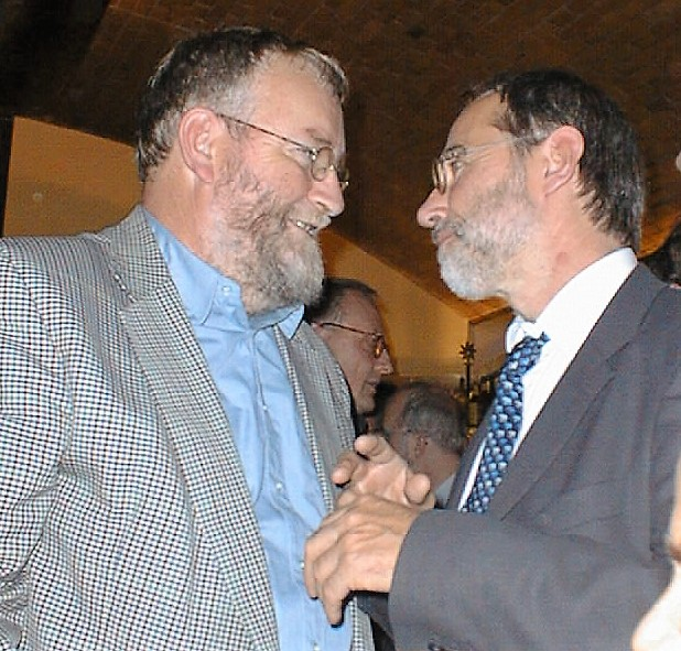 NORIS Informatik 2000 Treffen am 22. September 2000 im Rahmen der GI-Jahrestagung. Kees Koster (links) und Stefan Jänichen.